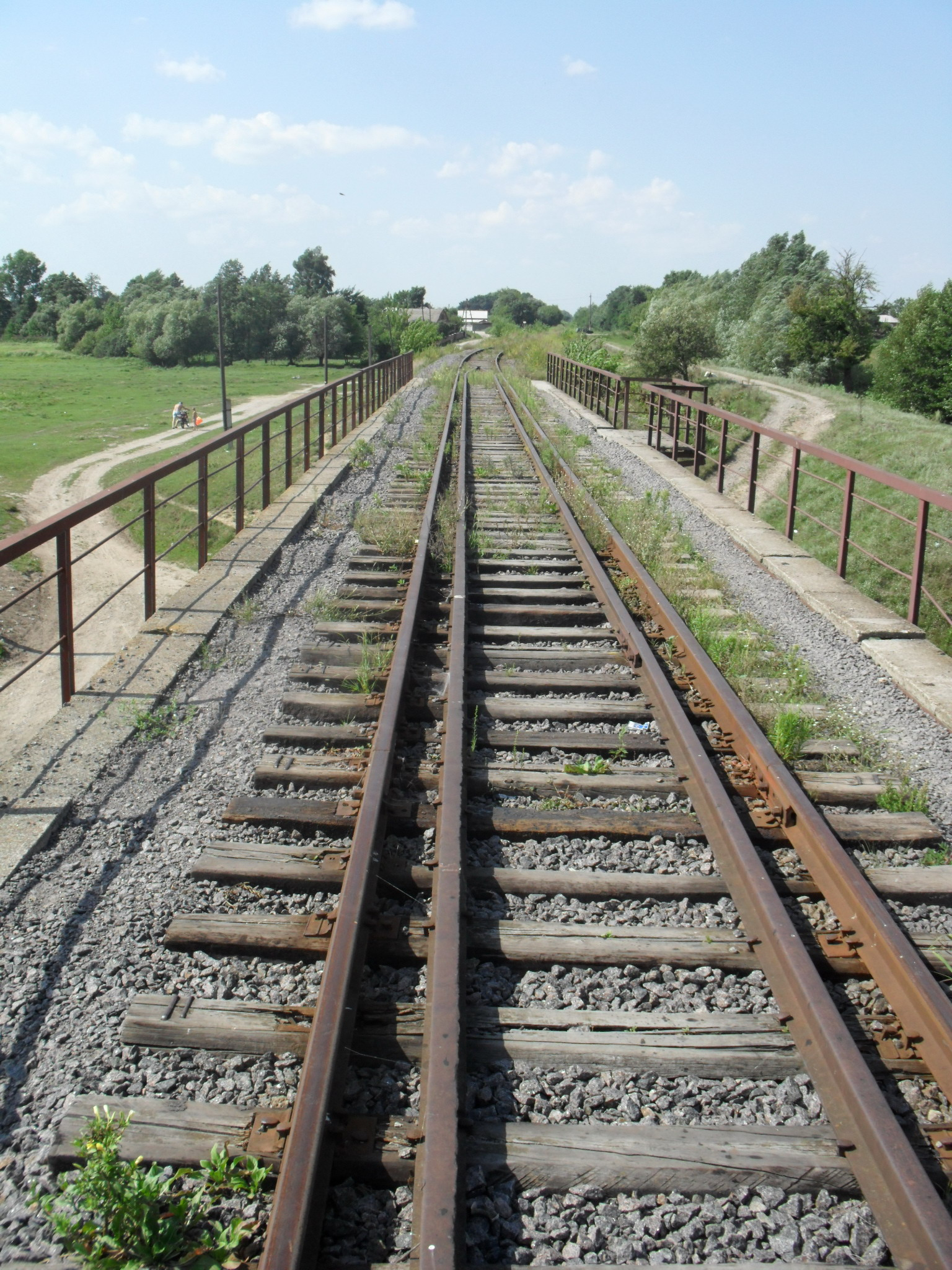 смт Турбів. Залізничний міст